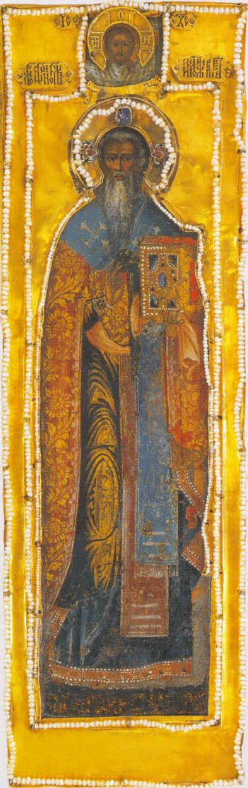 Священномученик Симеон Персидский 1665 г. Федор Зубов, Москва. "Родимая" икона царевича Семена Алексеевича. ГМЗМК. Инв. Ж-545/1-2. 51х16 см. (Власова Т.Б. История формирования иконостасов Архангельского собора // Архангельский собор Московского Кремля. М., “Красная площадь”, 2002: 249, илл. на с. 250).